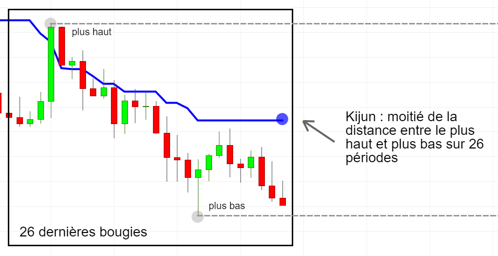 Description de la Kijun - Ichimoku